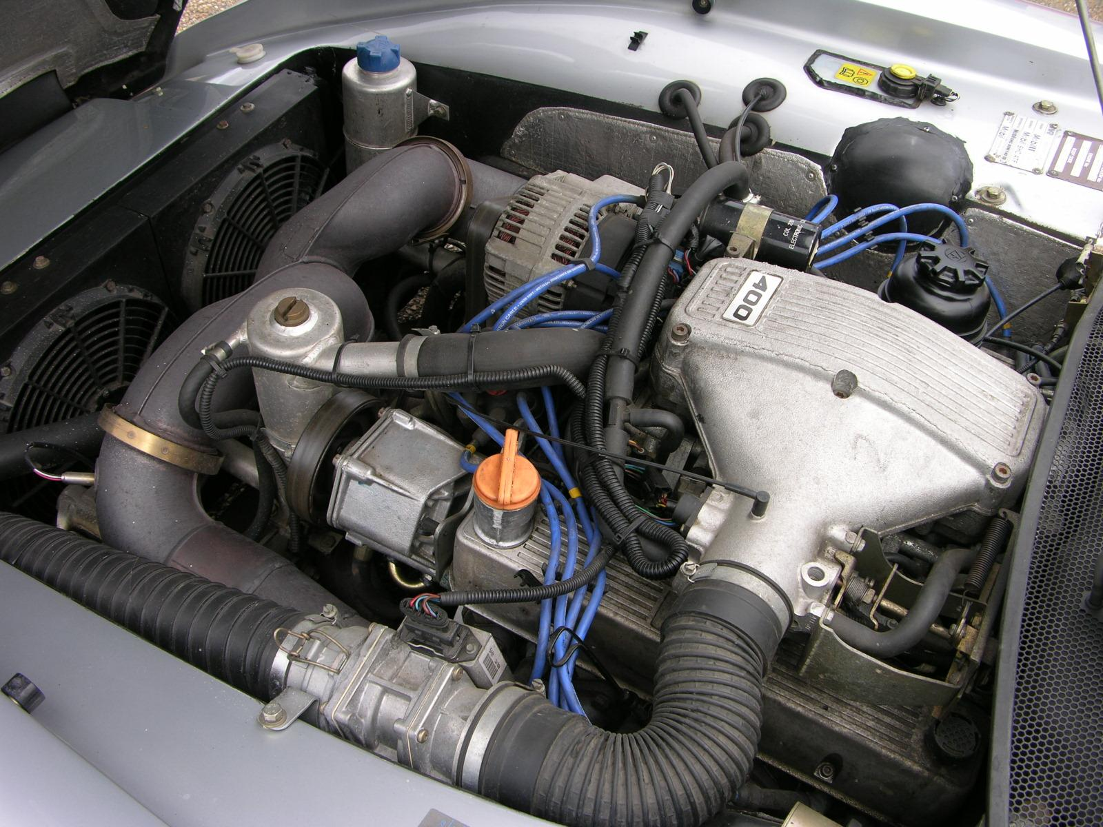 1997 TVR Chimaera 4.0